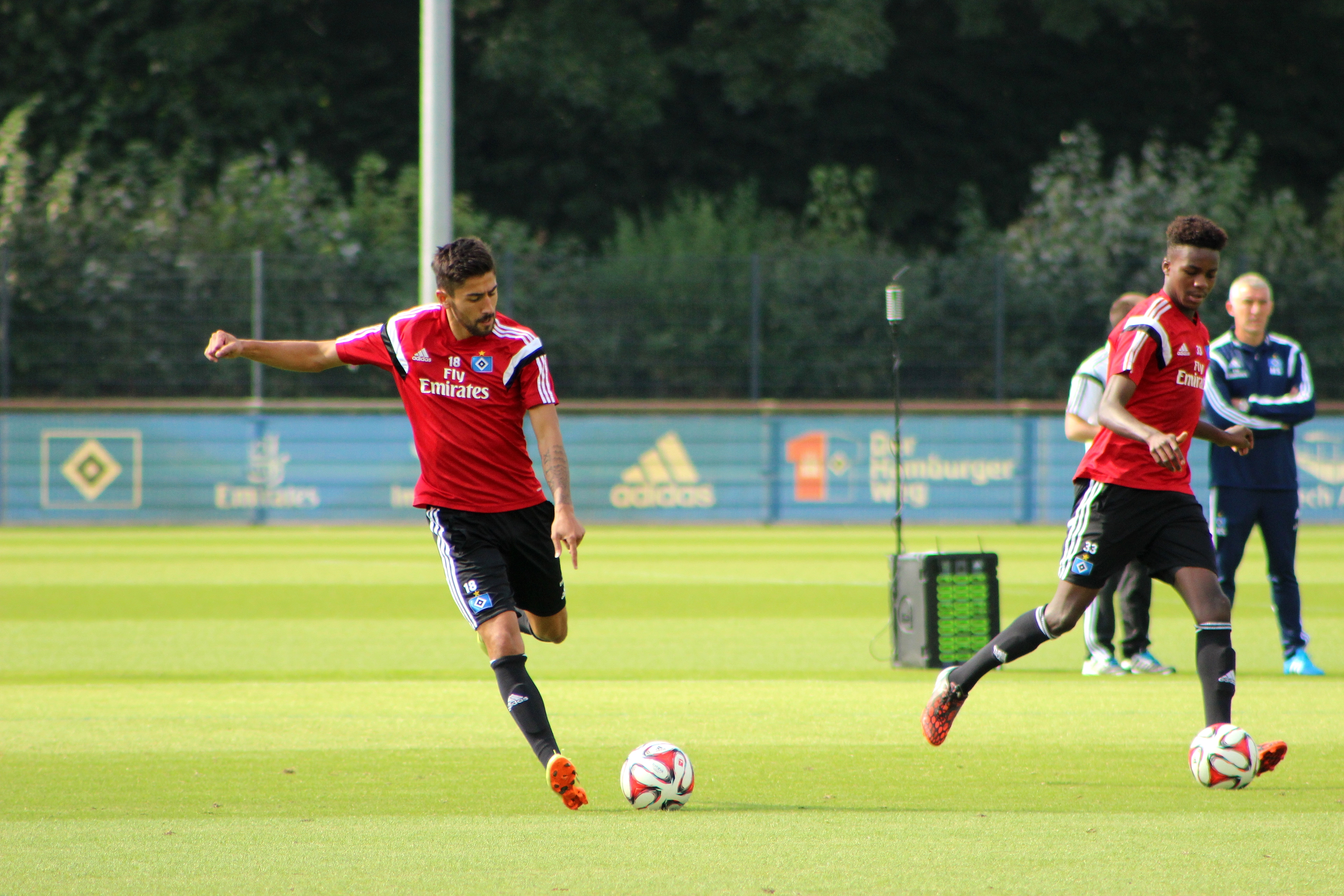 Kerem Demirba und Gideon Jung beim HSV-Training